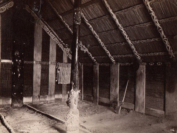 Maori. Intérieur d' une maison de réunion, à éléments sculptés et peints. Les sculptures sont le fait des hommes, les peintures sont exécutées par les femmes. Interior of a Maori meeting house with carved and painted elements. The carvings are the work of the men, the paintings are carried out by the women.